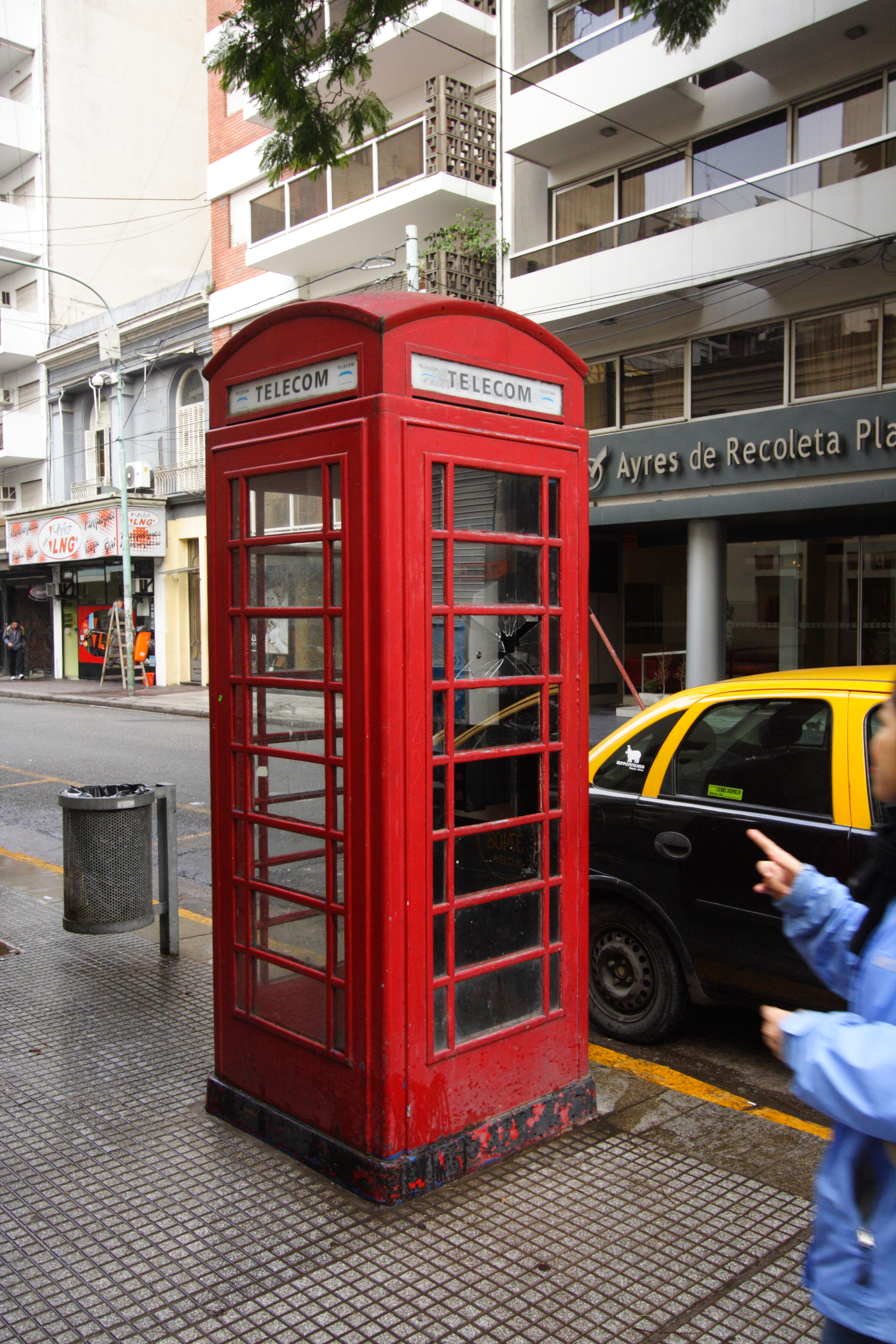 Телефонная будка в Буэнос-Айресе